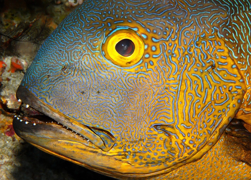 Cabeza de Macolor macularis, Maldivas.